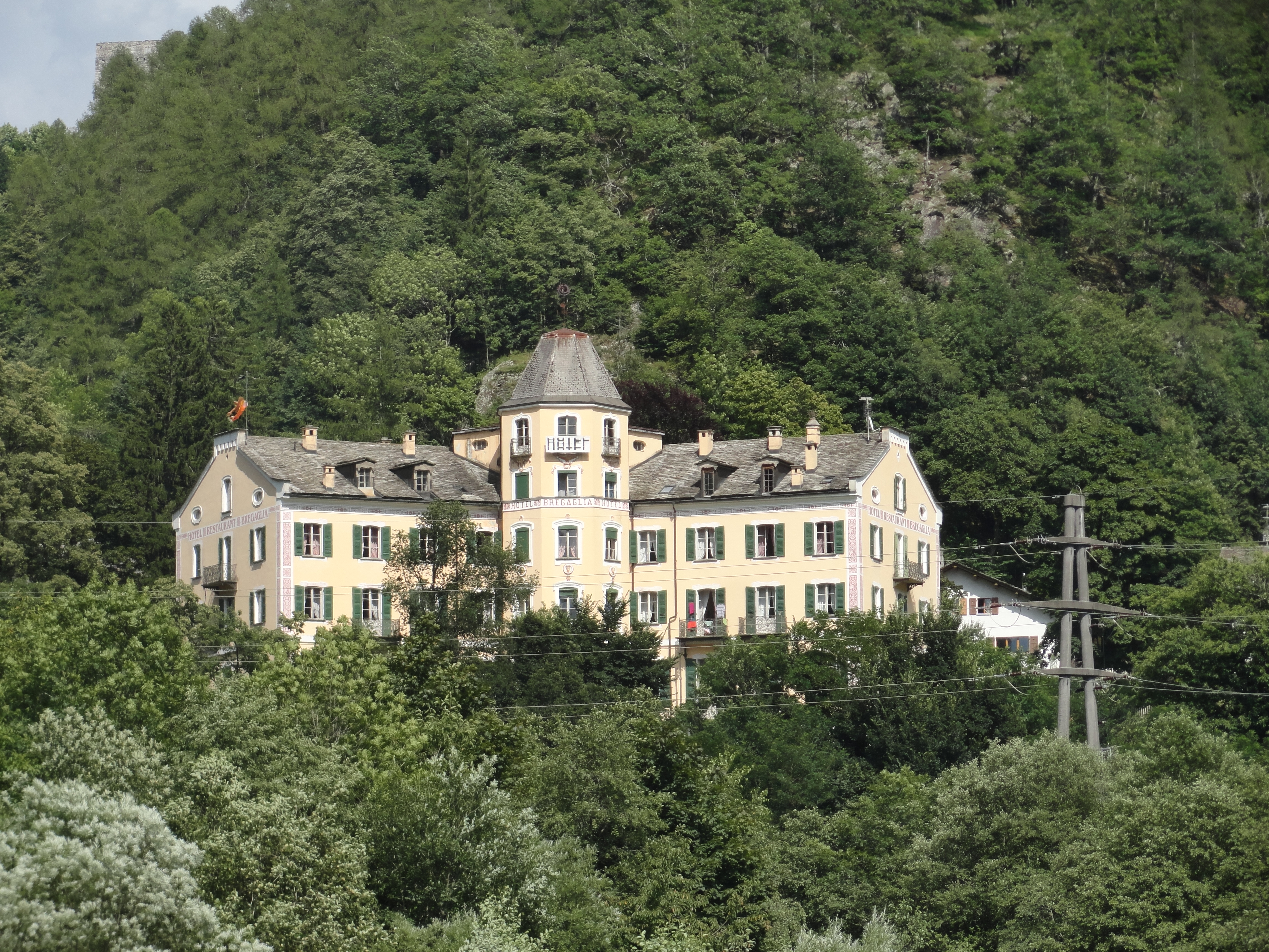 Hotel Bregaglia Talseite